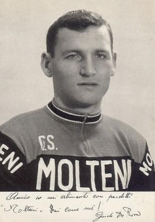 Guido De Rosso